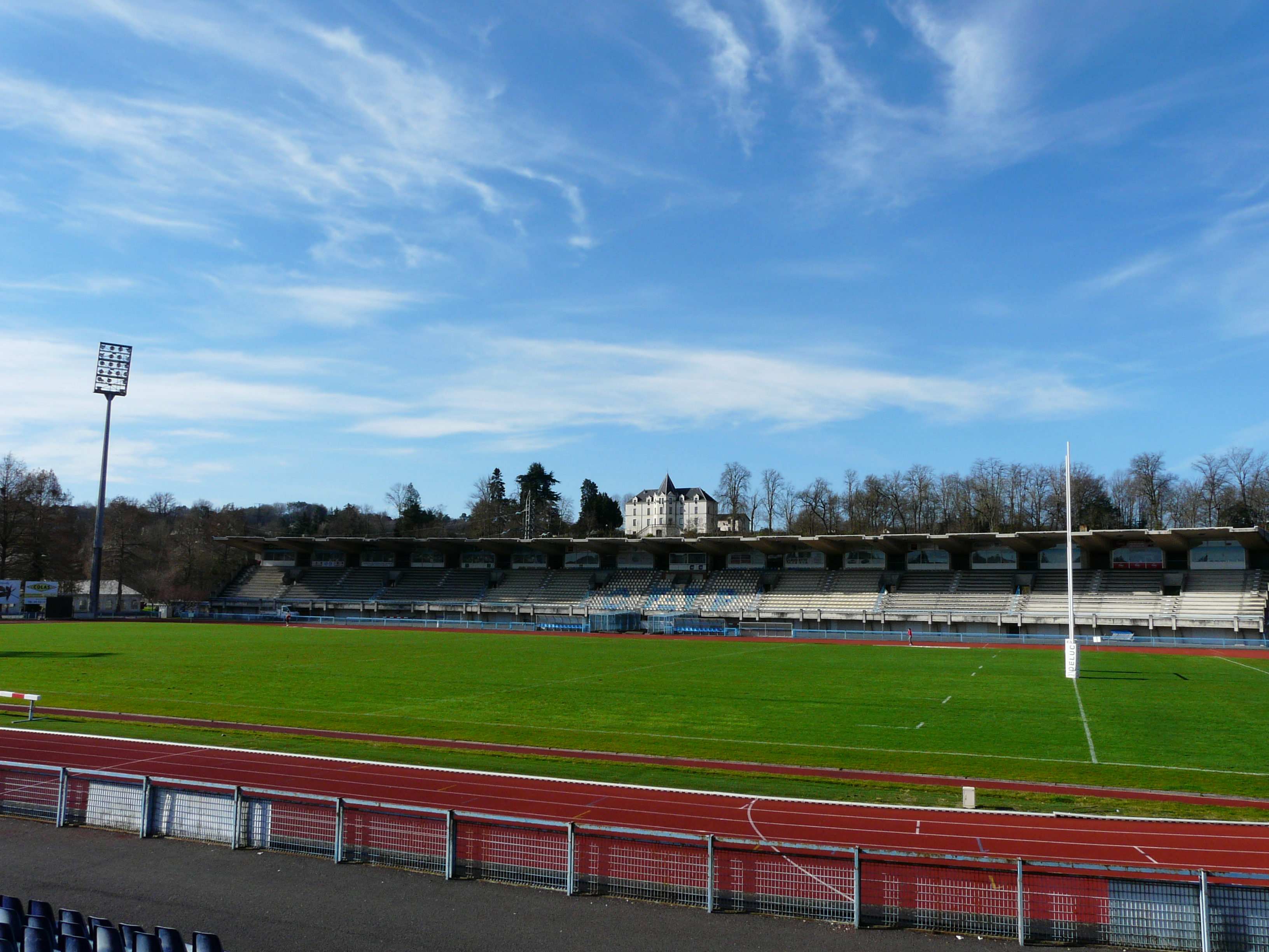 Le stade Francis-Rongiéras, Périgueux, Dordogne, France.